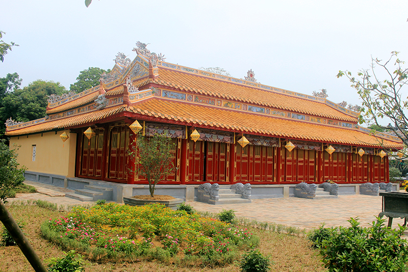 Triệu Tổ Miếu